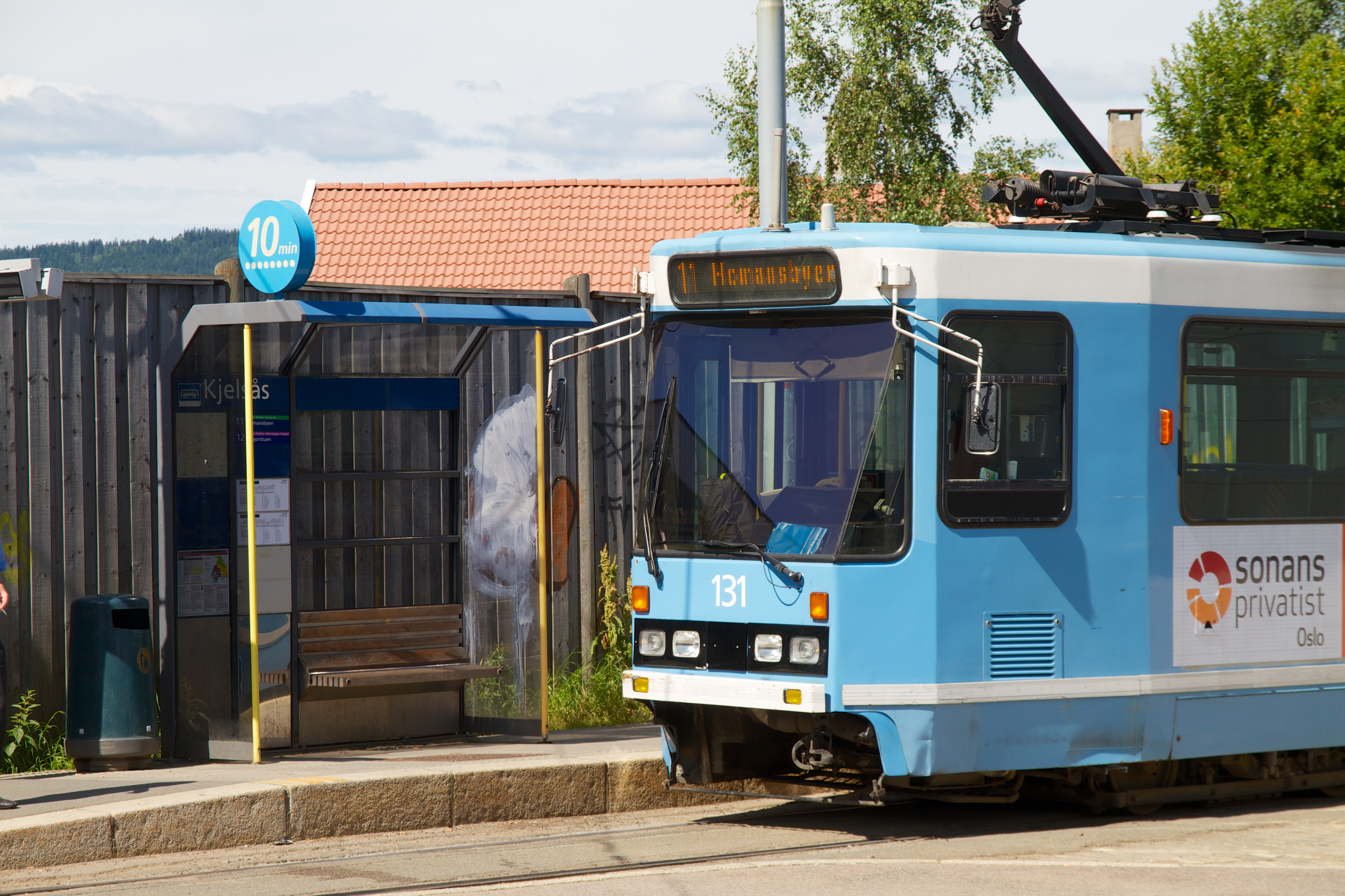 Kjelsås holdeplass